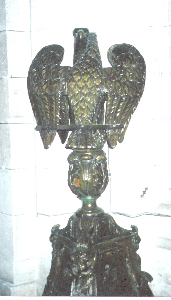 Le lutrin de l'église de La Roche-Chalais